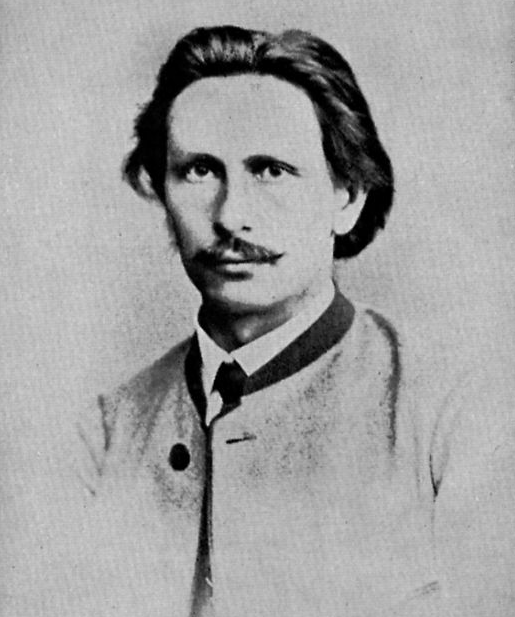 Abb. 4. Im 25. Lebensjahr